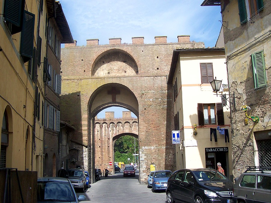 Siena - Porta Ovile